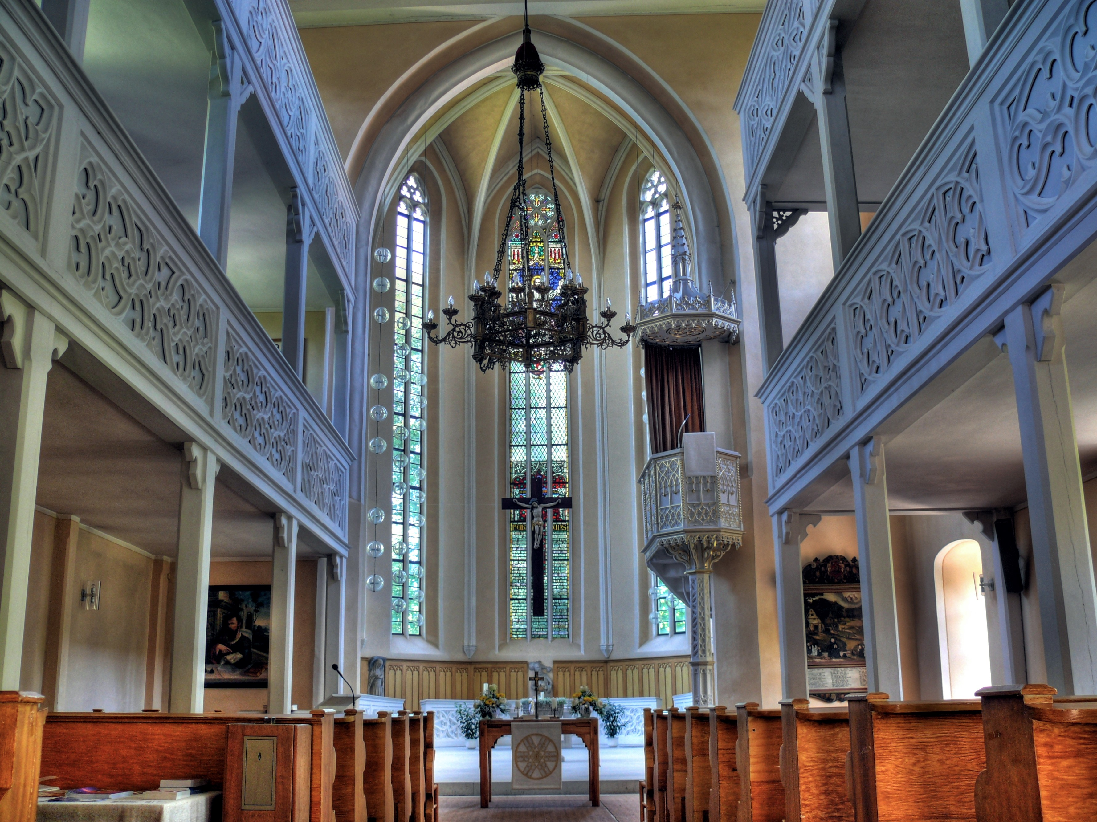 Kirchenschiff und Chorraum der Klosterkirche